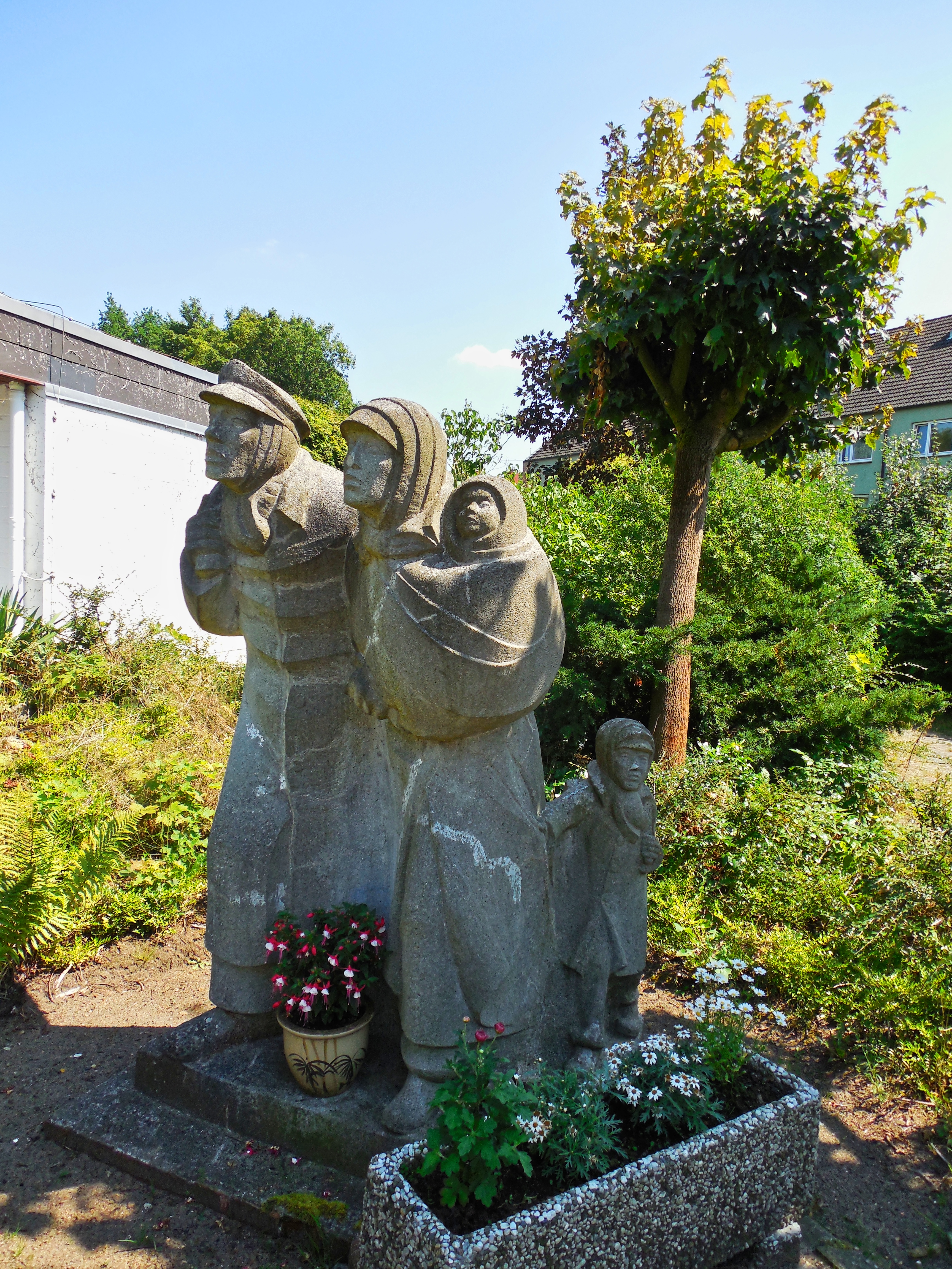 Norderstedt, Germany